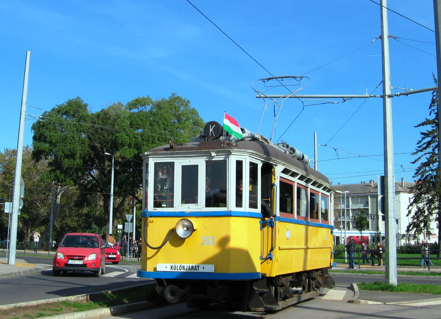 nosztalgiavillamos